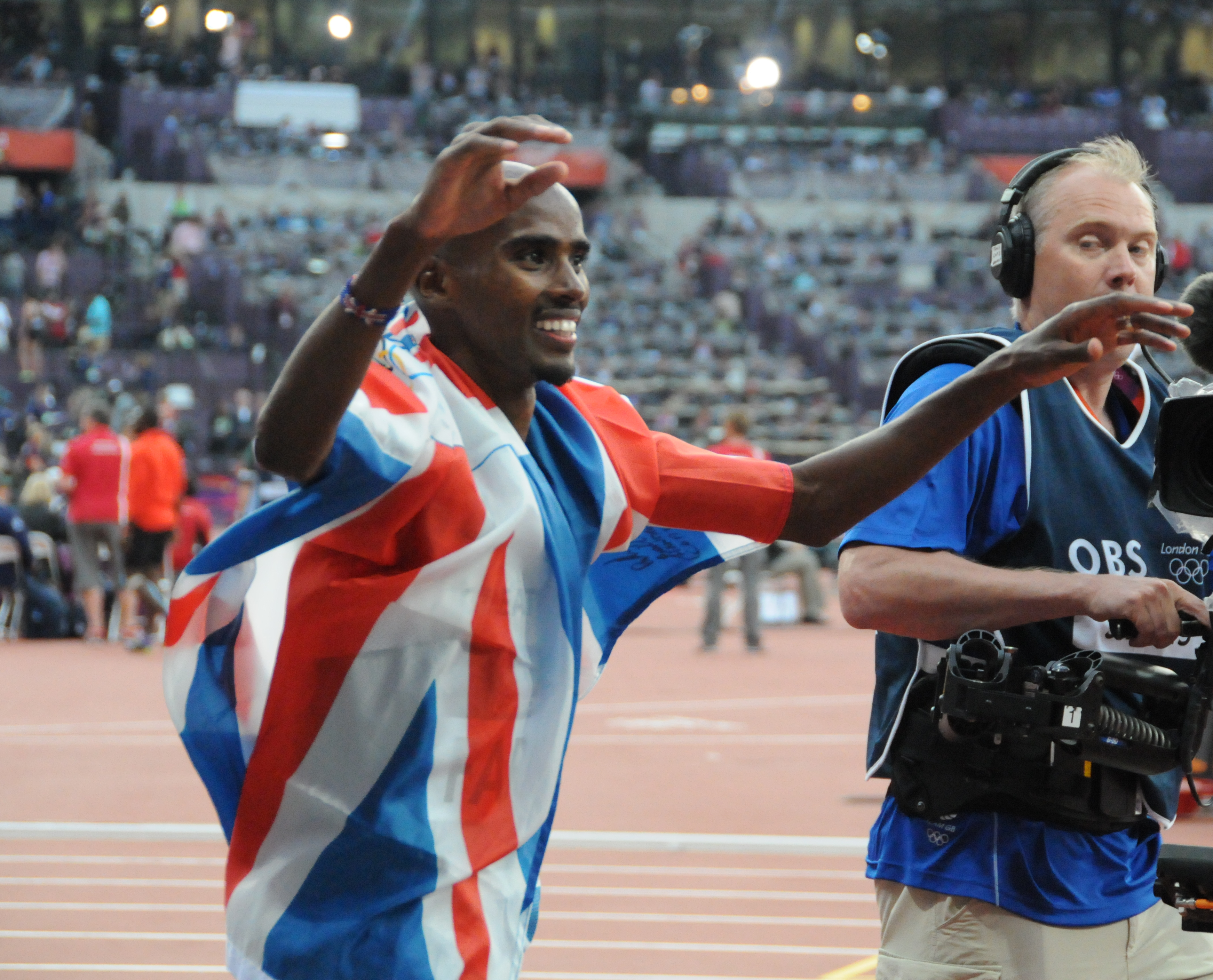 Mo Farah double vainqueur du 5000-10000m à Londres 2012